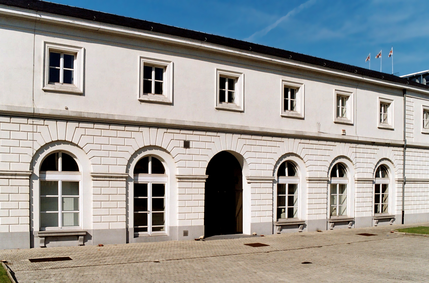 Belgique - Bruxelles - Écuries royales